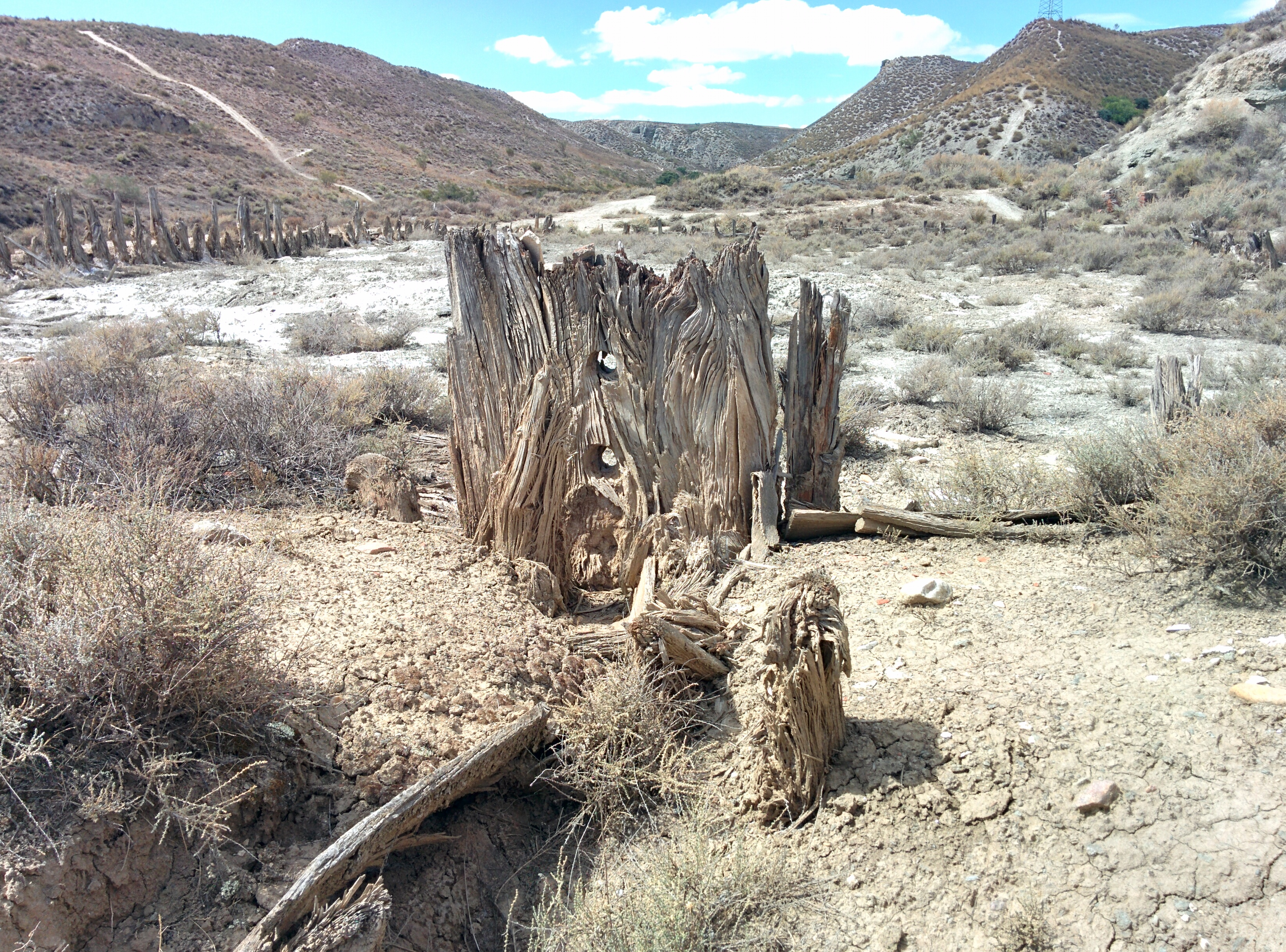 Salinas Espartinas, en Ciempozuelos (Madrid, España).